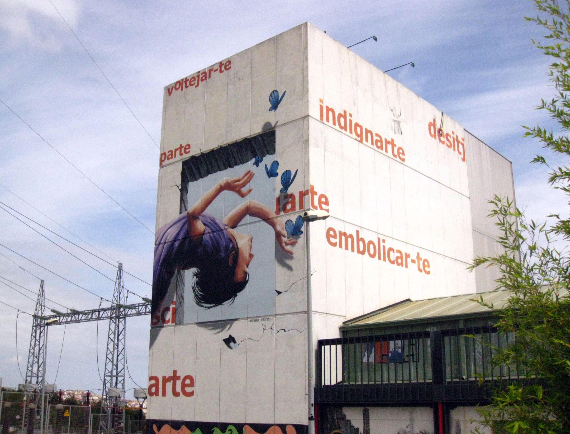 Arte (Colectivo Almorrana). C. Portlligat (Barcelona)